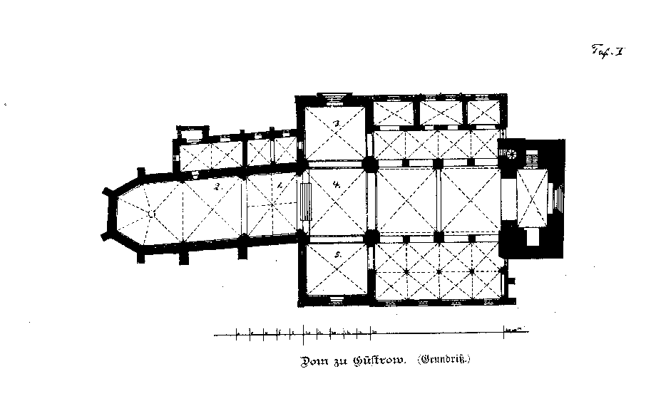 Grundriß des Domes zu Güstrow